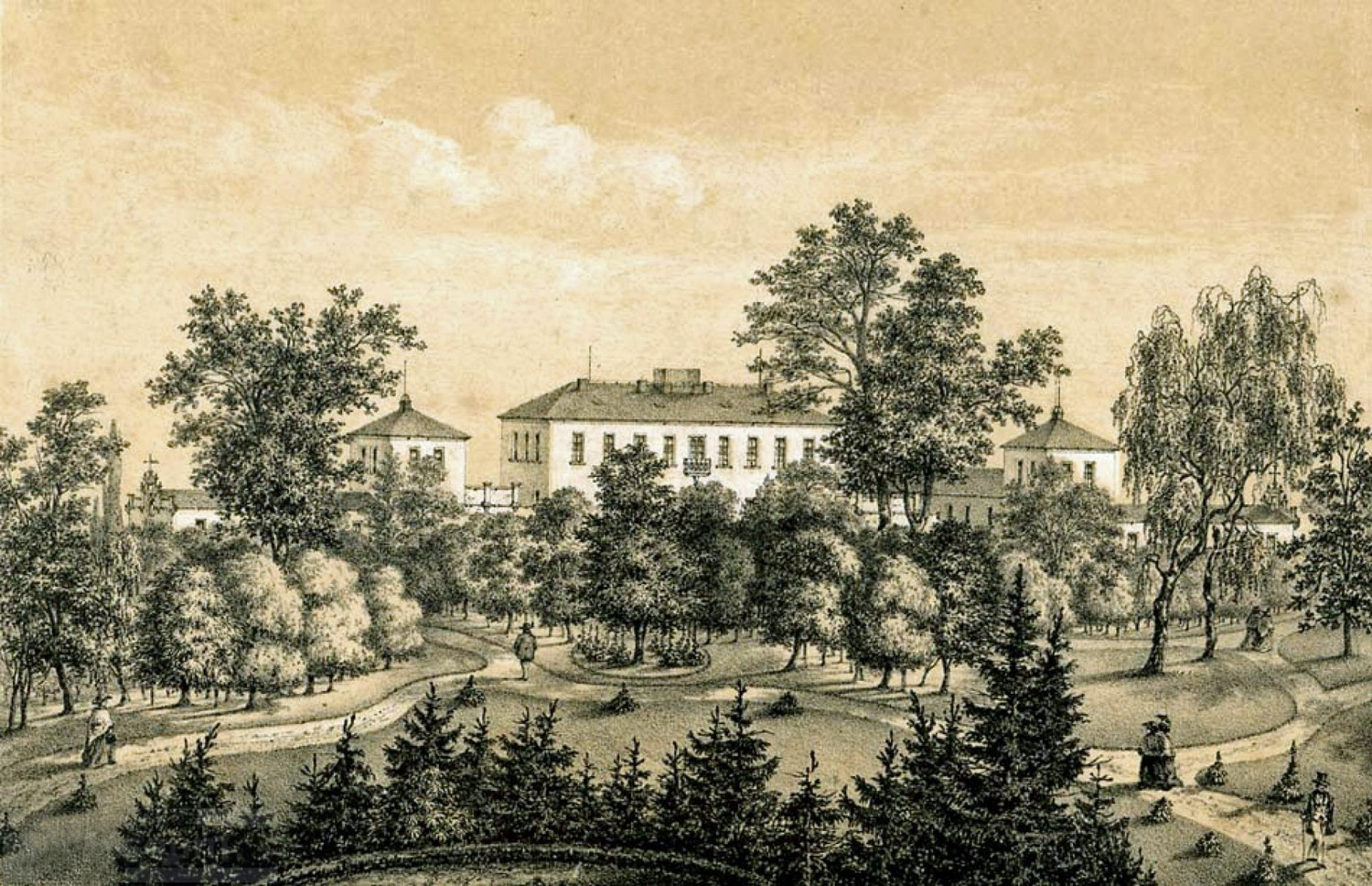 Die Irren-Heil- und Pflege-Anstalt des Dr. Eduard Wilhelm Güntz in Thonberg bei Leipzig 1861